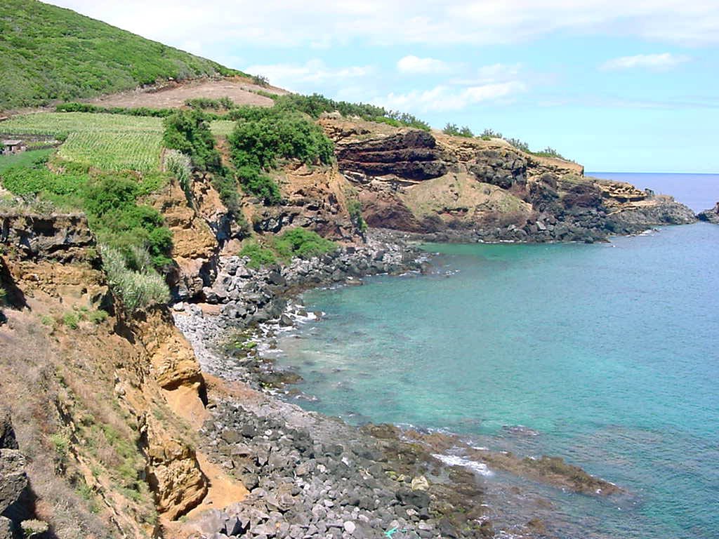 Baía das Contendas, Costa, ilha Terceira, Açores, Portugal